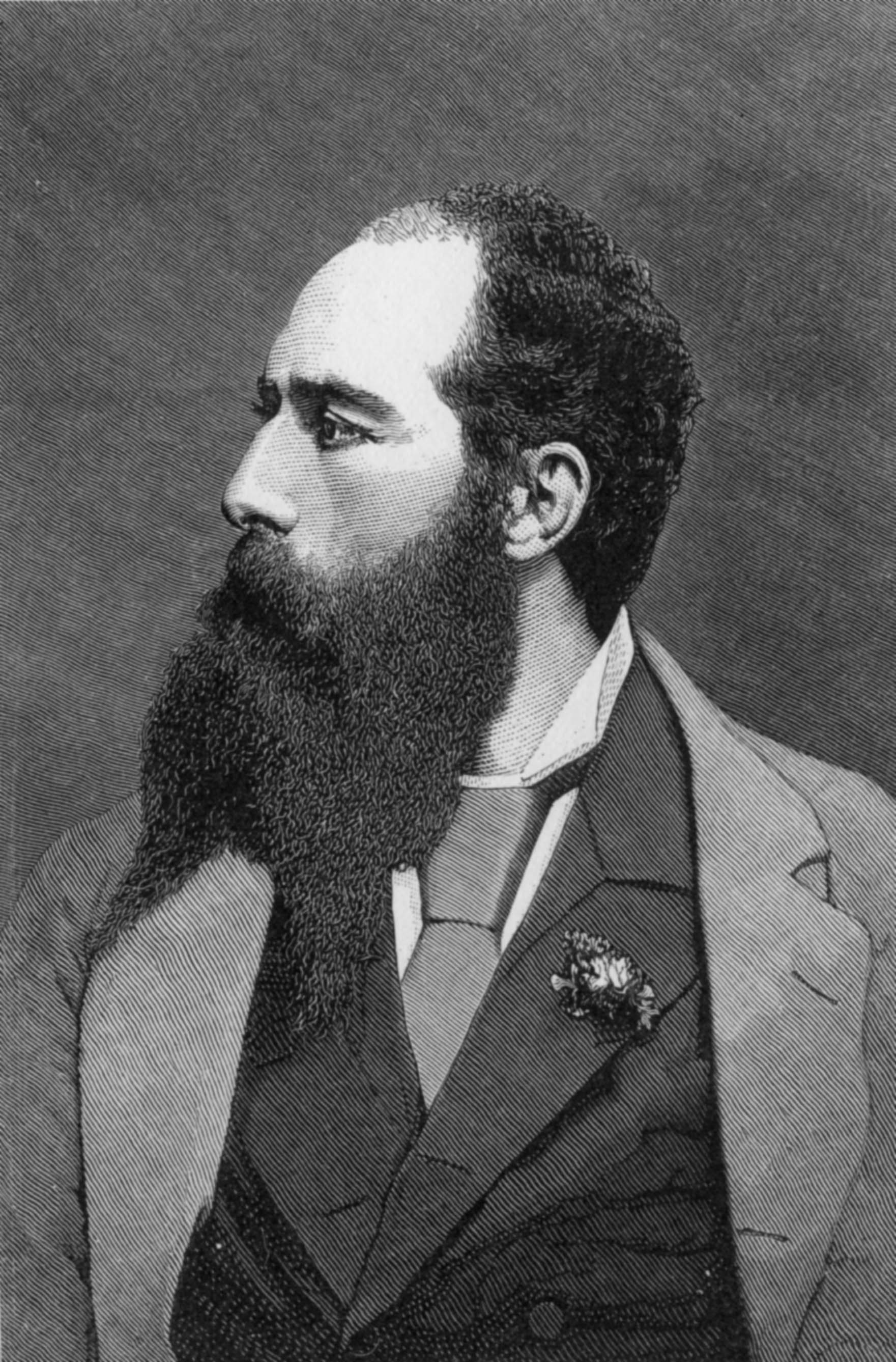 Luigi Maria D'Albertis (1841-1901), ritratta da un pannello al Museo delle Culture del Mondo di Genova.